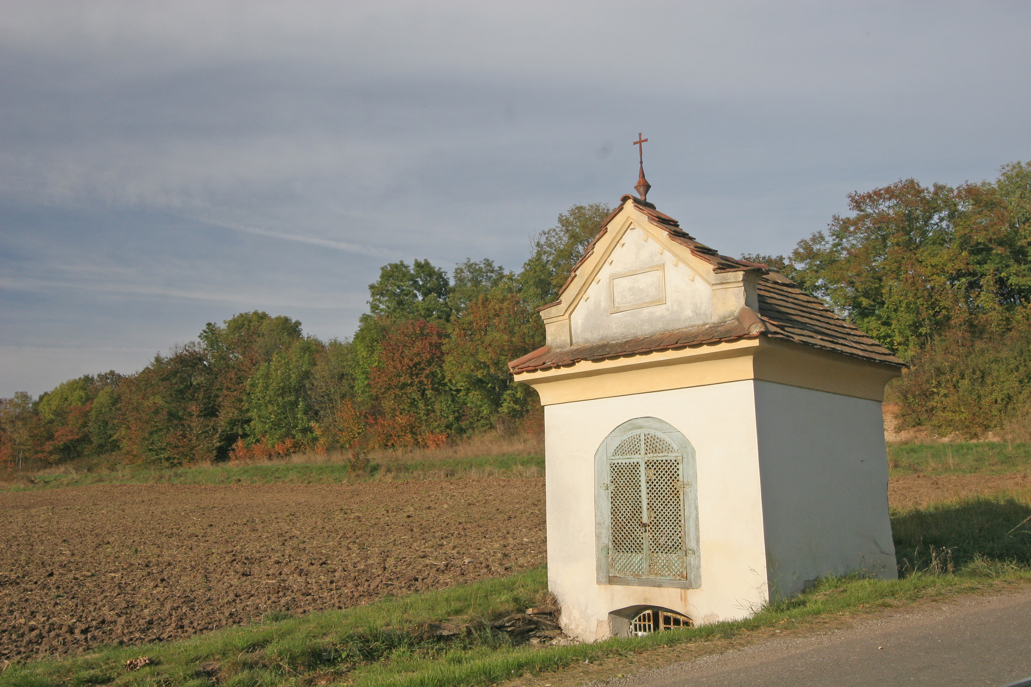 Výrava kaplička